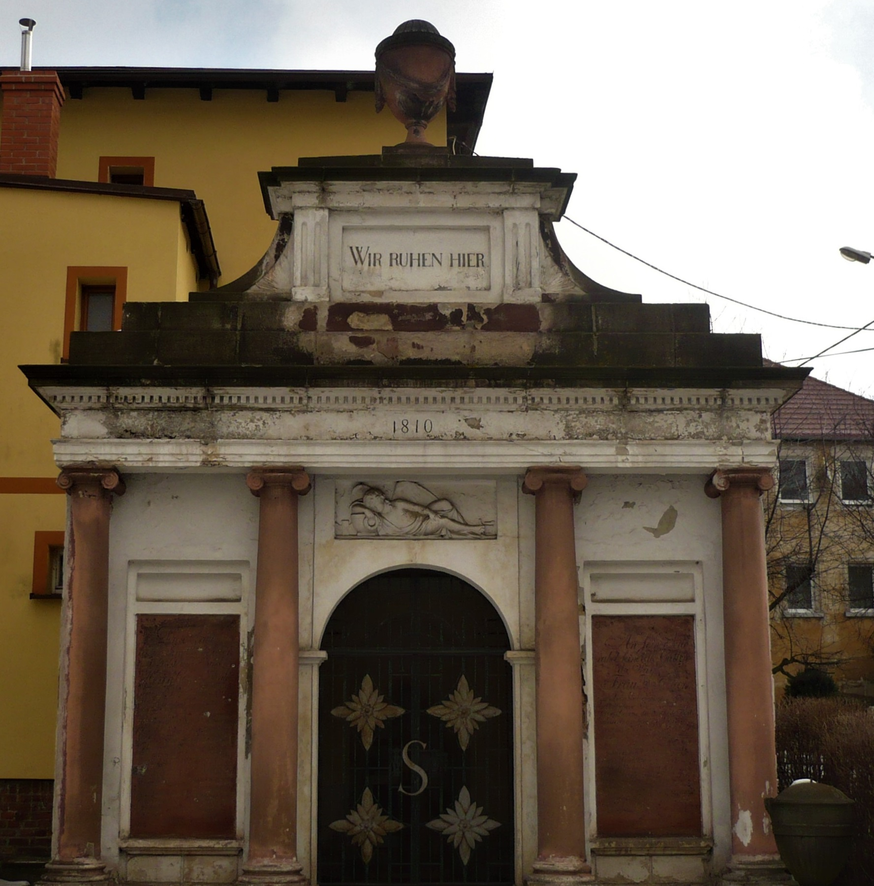 Walim, kaplica grobowa Seylerów, ul. Wyszyńskiego, z około 1800 r.